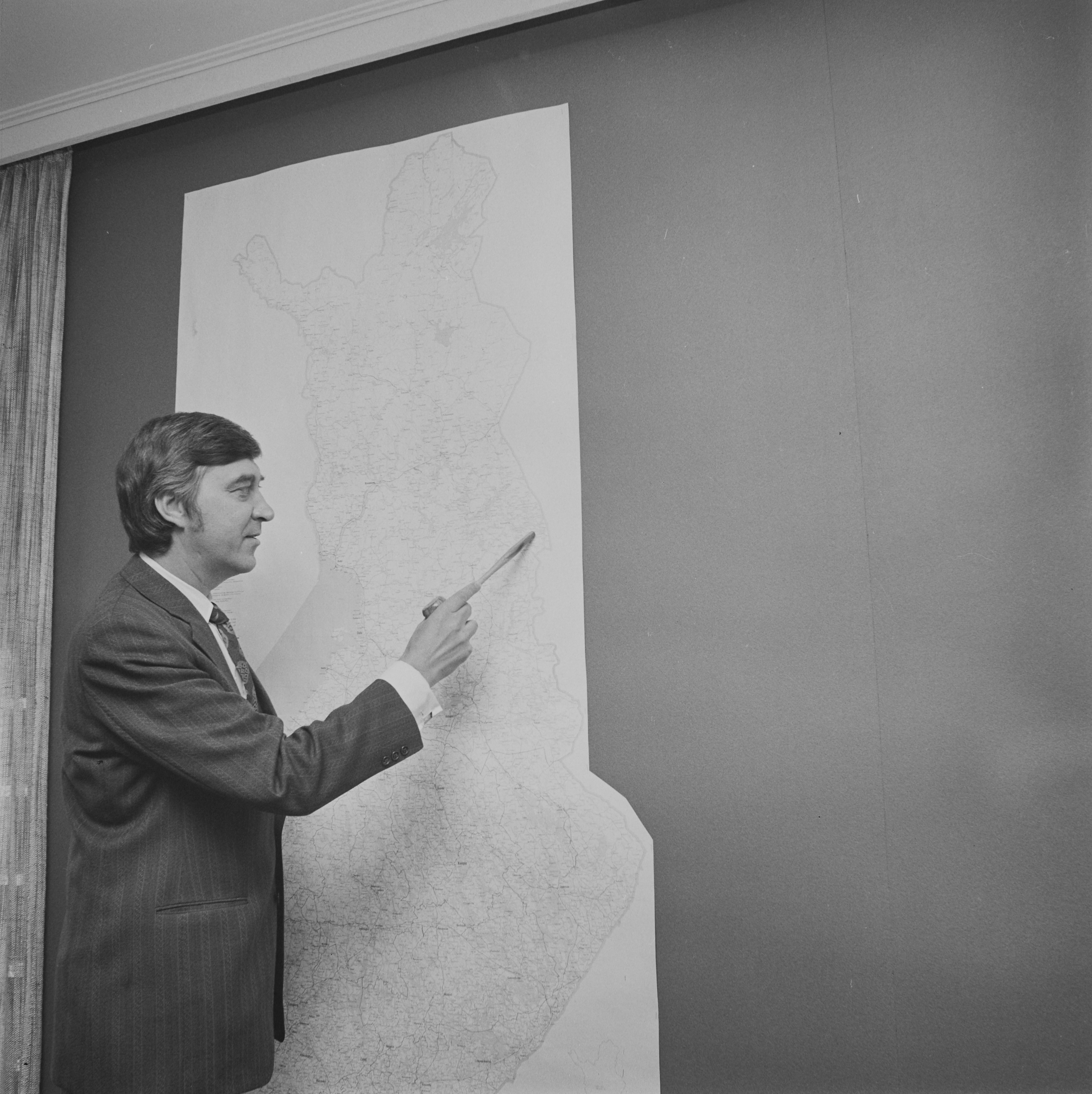 Vesihallituksen pääjohtaja, diplomi-insinööri Simo Jaatinen (1924–1999).